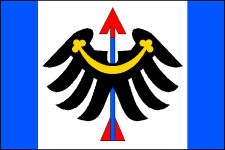 Flag of Střelná